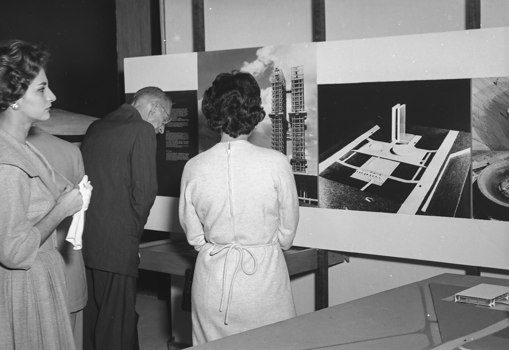 Imagem do Fundo Agência Nacional, do Arquivo Nacional